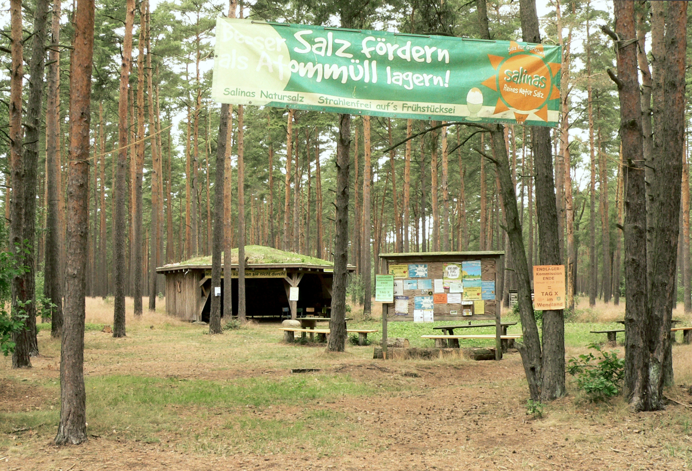 Infopunkt mit Hütte am Atommülllager Gorleben